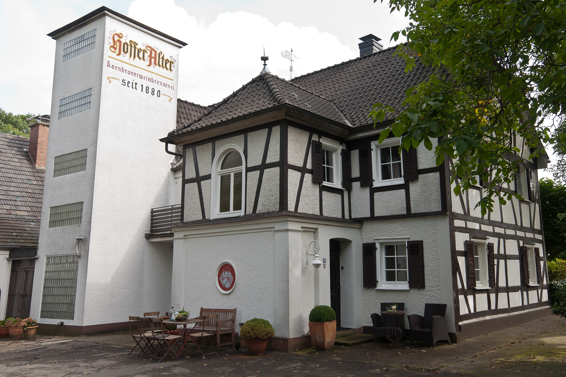 Rösrath, Denkmalnummer 60, Hofferhof 68 (Kornbrennerei)